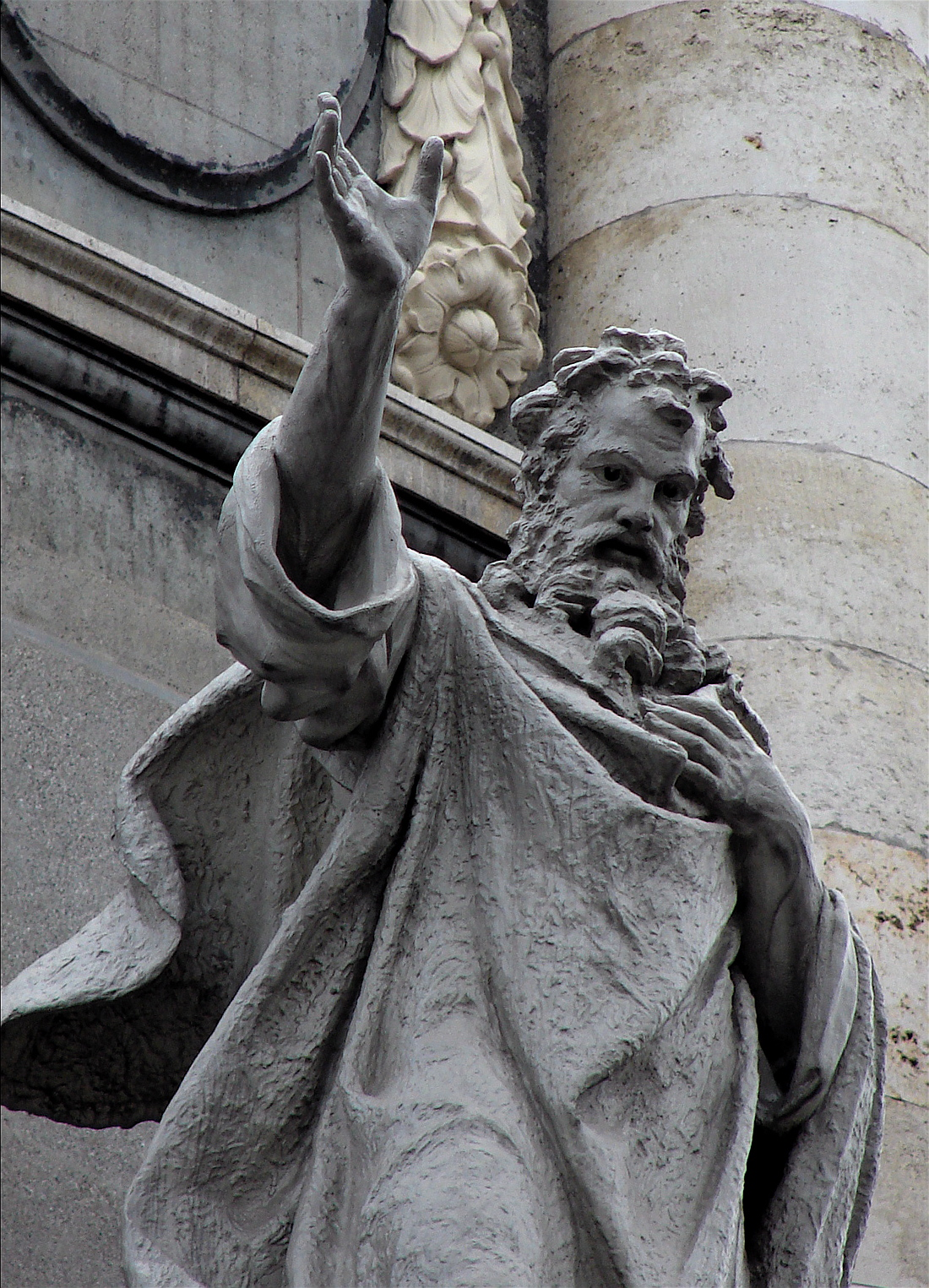 Irenæus af Lyon, Carl Rohl Smith, 1883-84, Frederikskirken, København